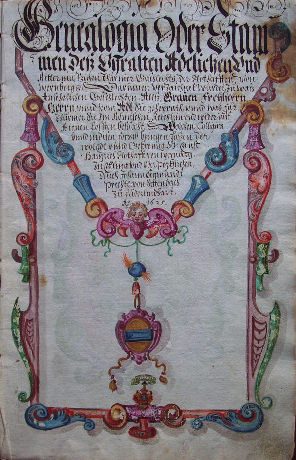 Titelblatt der Chronik der Wernberger Linie von Johann Sigmund Brechtel, 1625